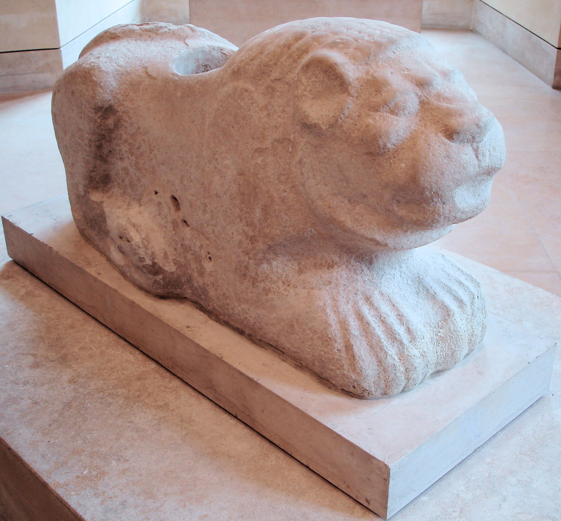 Statue de lion-gardien Règne de Puzur-Inshushinak Vers 2100 avant J.-C. Calcaire Fouilles J. de Morgan, 1904, tell de l'Acropole